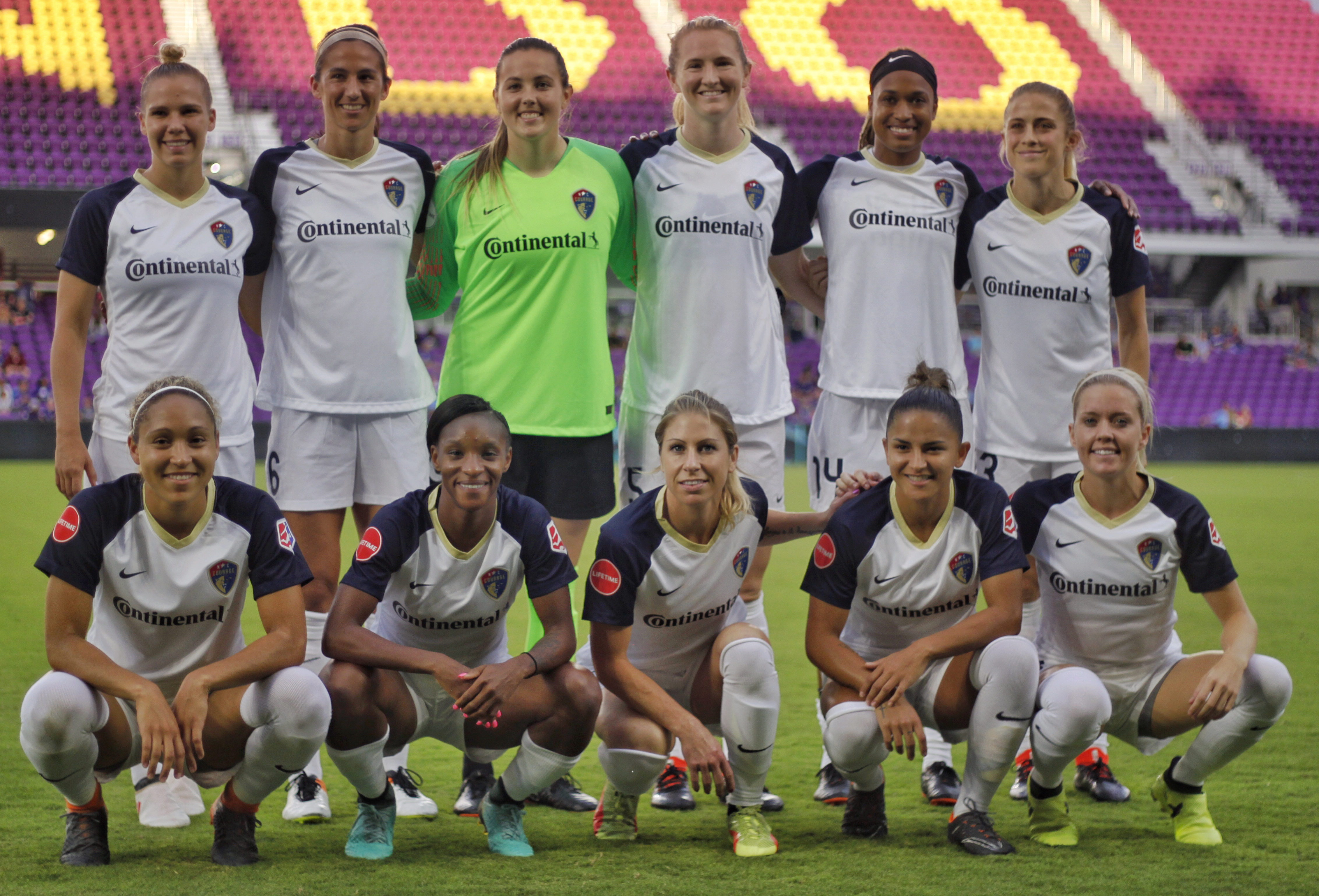 Starters